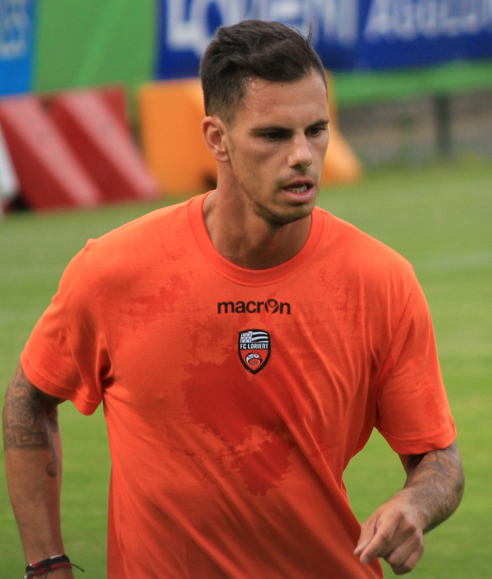 Jérémie Aliadière lors de la reprise de l'entrainement du FC Lorient le 27 juin 2013